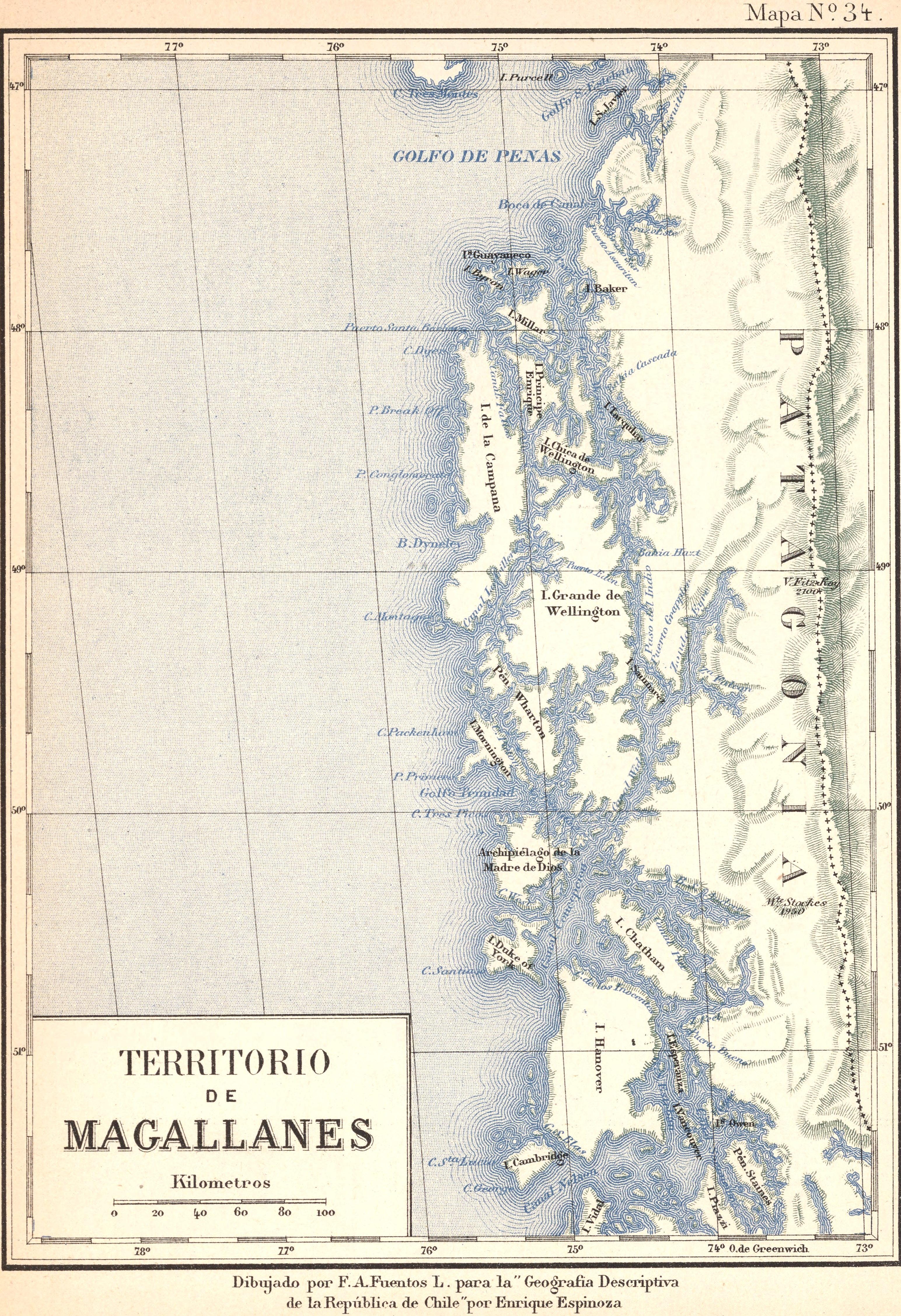 Mapa del Territorio de Magallanes (1853 - 1929), antecesor de parte de la Región de Aysén y Toda la Región de Magallanes y Antártica Chilena.